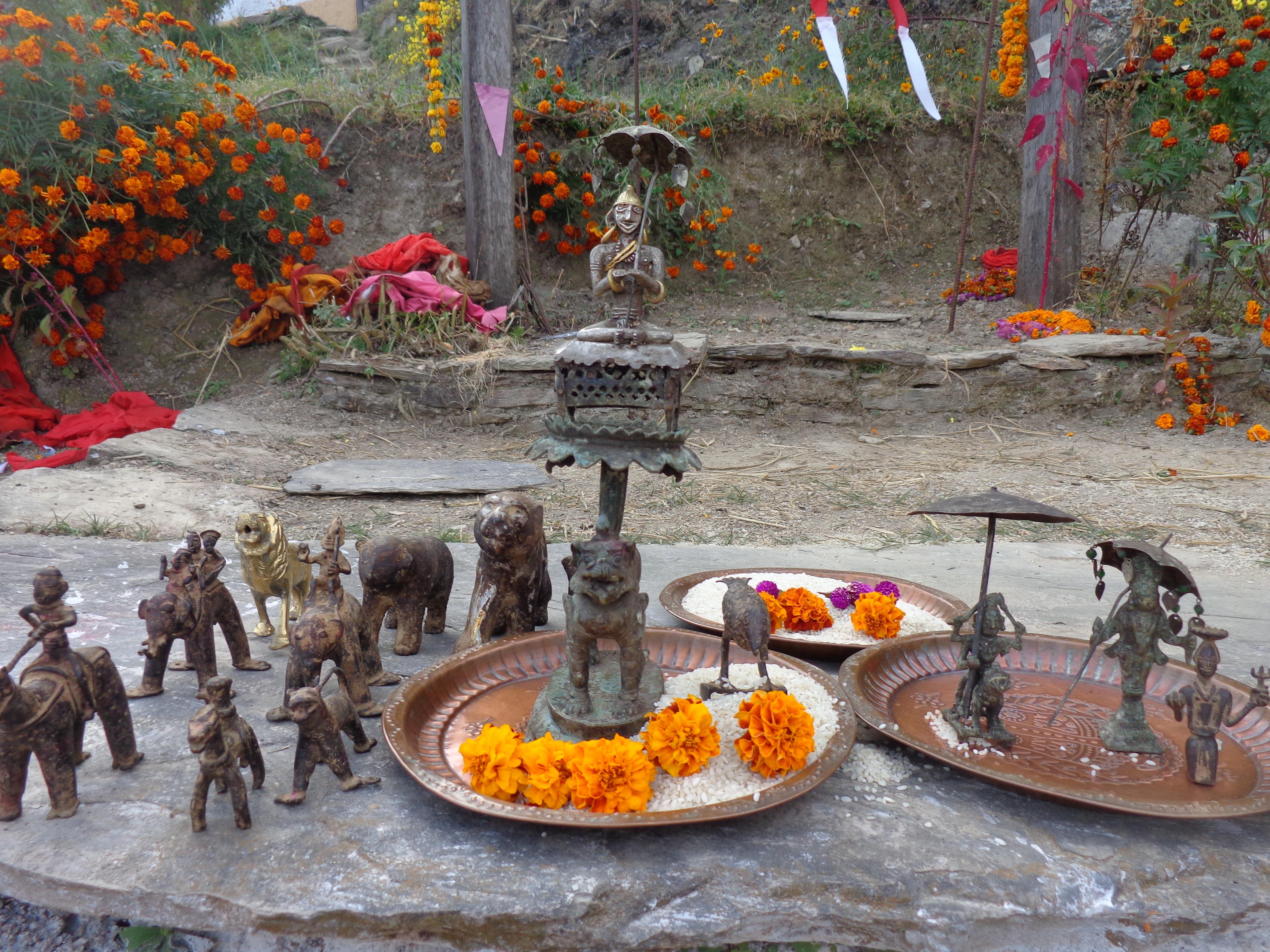 नेपाली: Kartikeya Dewata